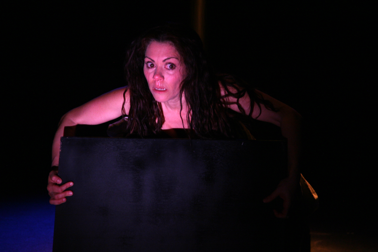 מיקי פלג רוטשטיין בהצגה פשוטה